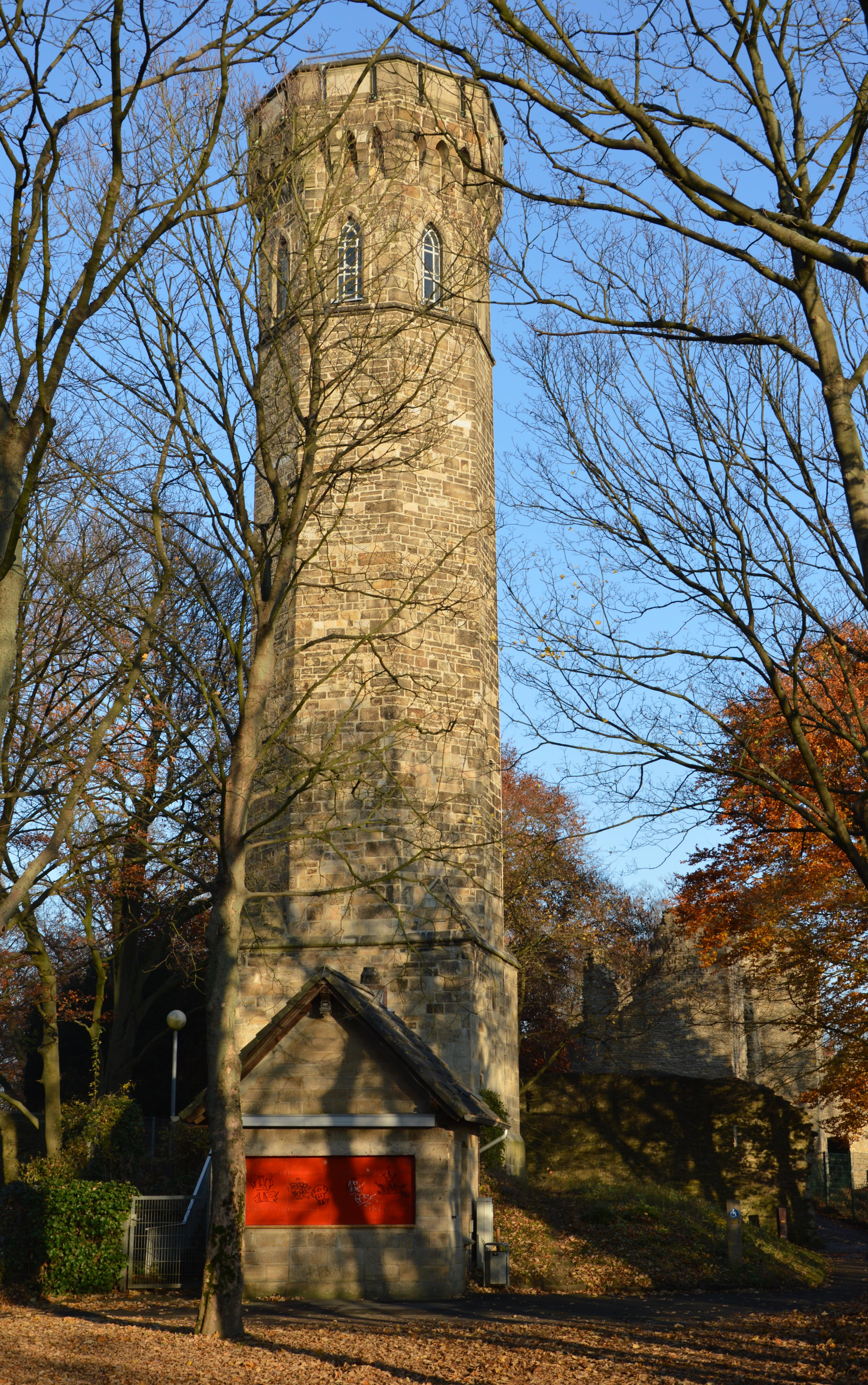 Vincketurm in Dortmund-Syburg, im Hintergrund die Ruine der Hohensyburg